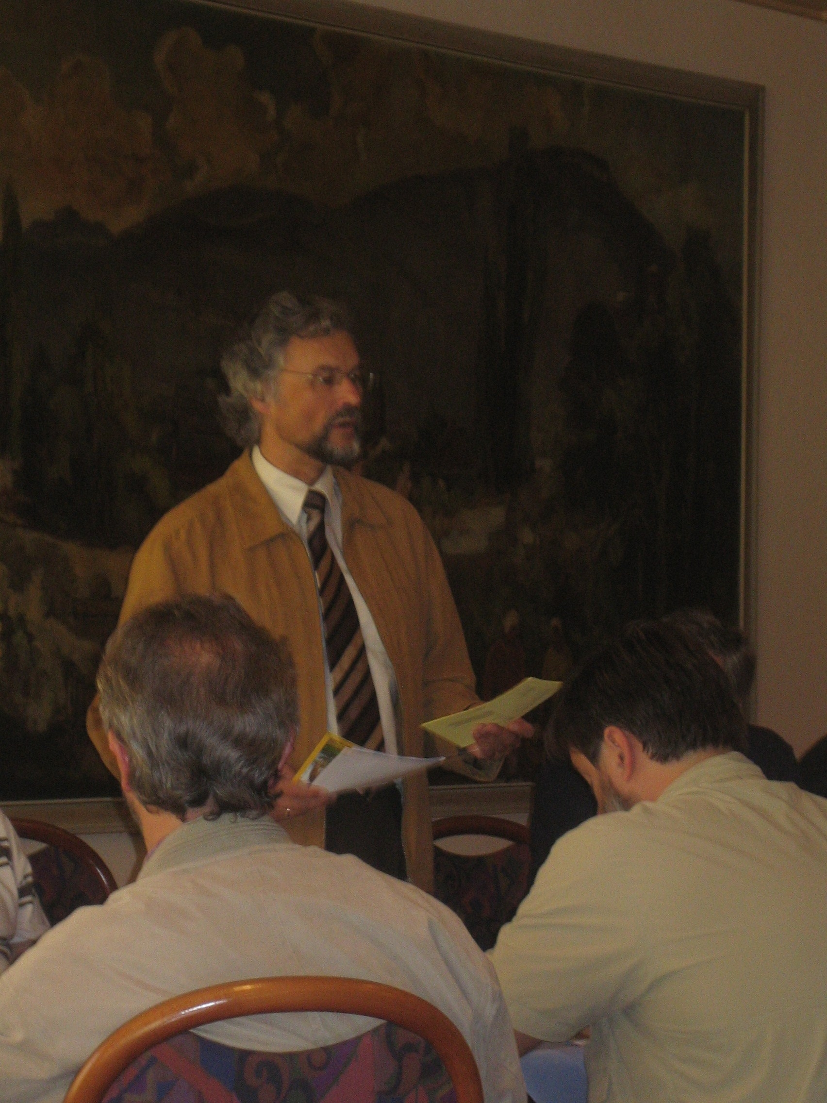 Hans-Joachim Riiter auf dem rheinland-pfälzischen ödp-Landesparteitag 2007